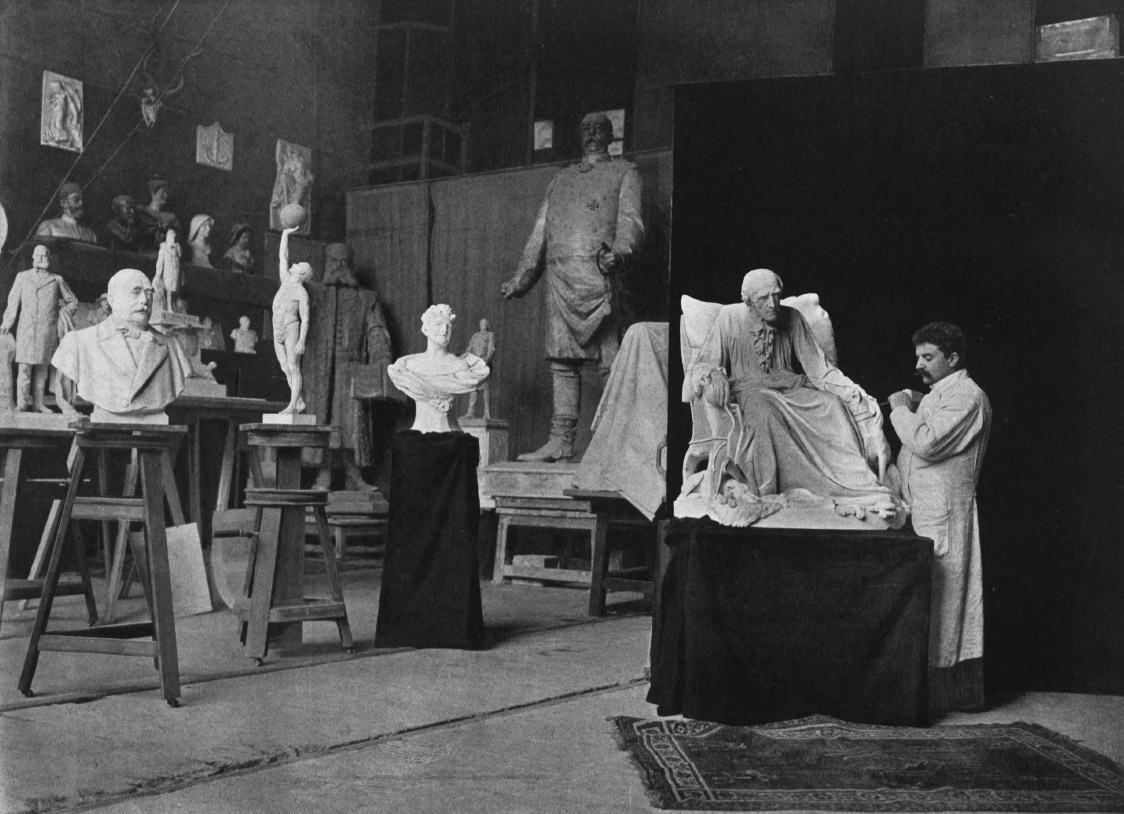 Harro Magnussen in seinem Atelier mit seiner Gruppe "Friedrich der Grosse in seinen letzten Lebenstagen".